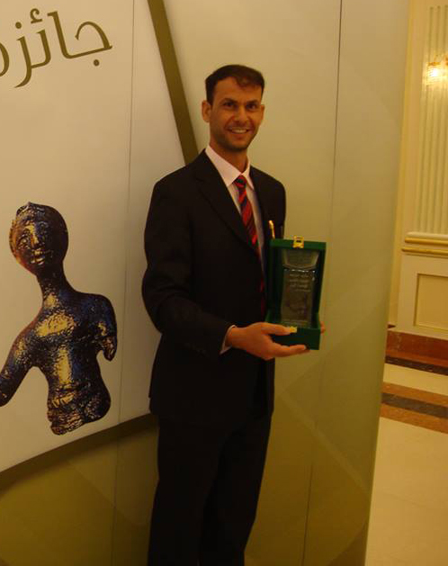 هيثم الشويلي